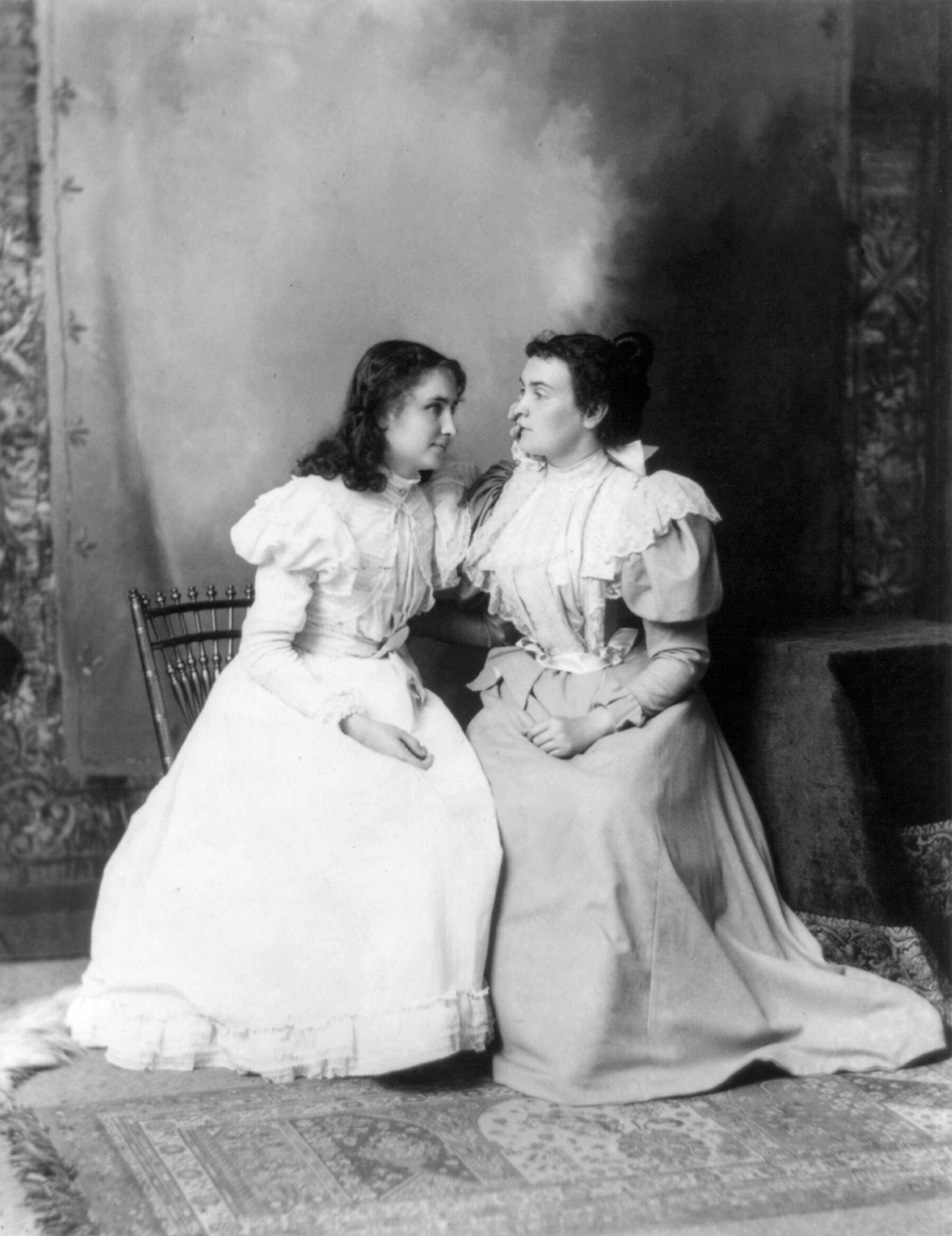 Helen Keller and Anne Sullivan